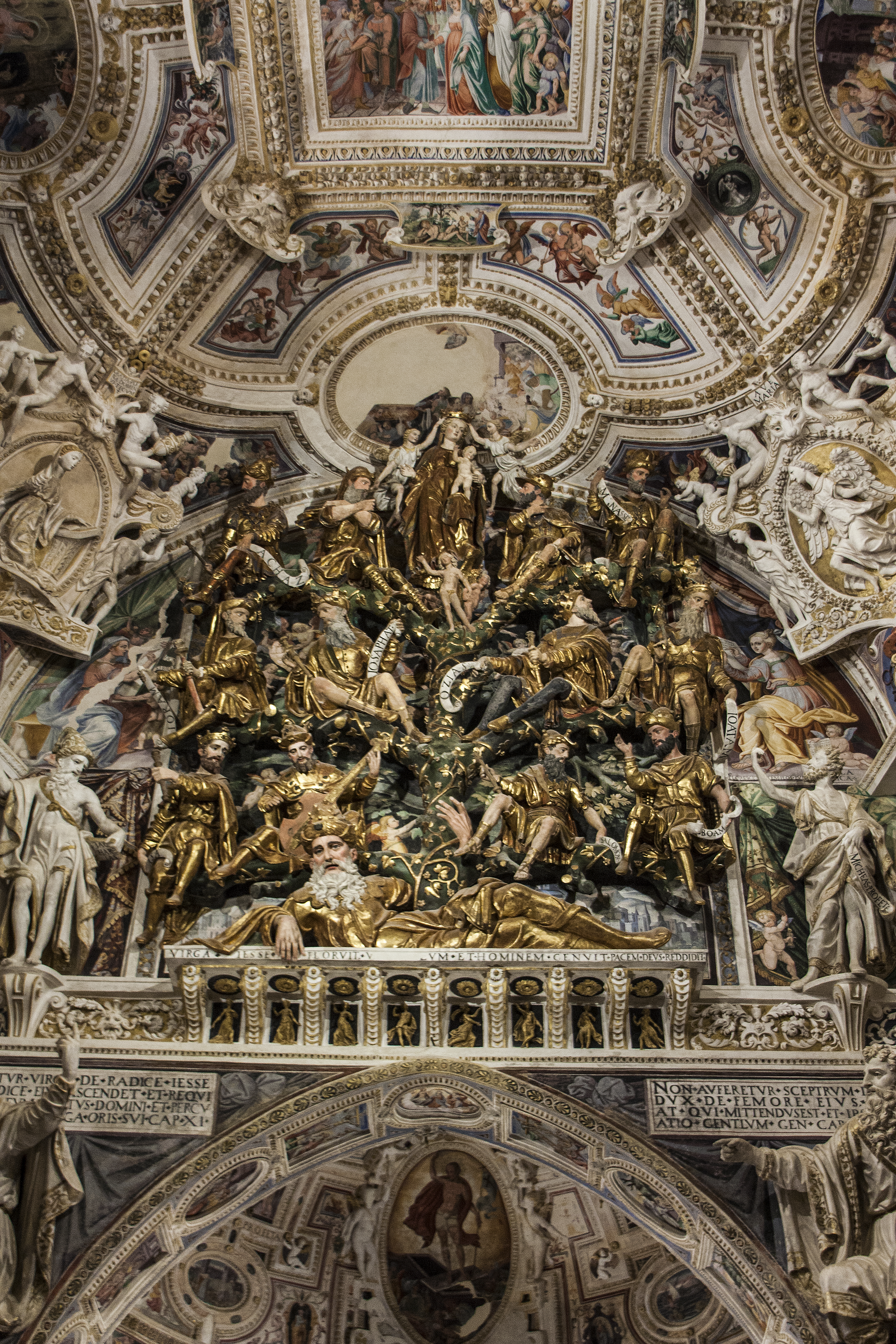 Chiesa di San Domenico (Castelvetrano)